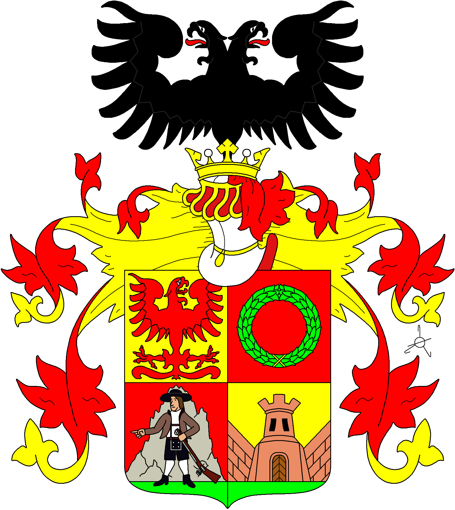 Erb rodu von Hofer (1818)